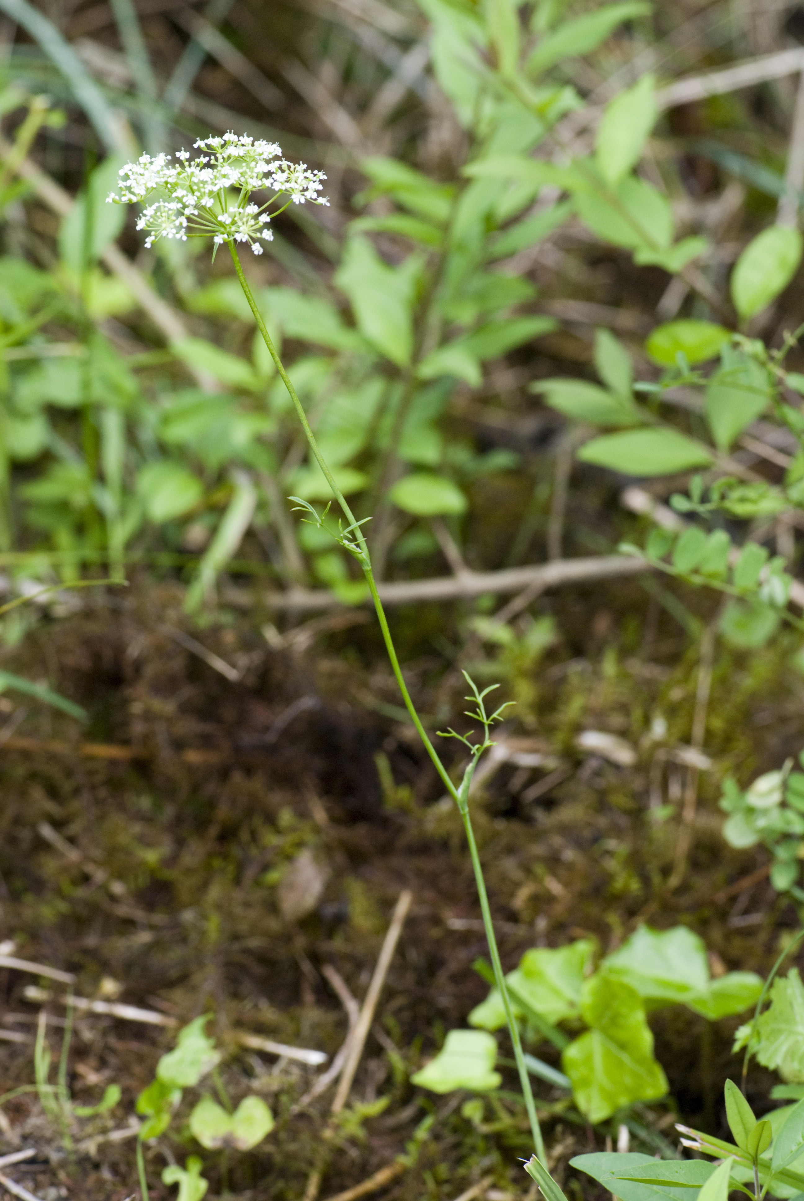 Bunium bulbocastanum Coteau de Chartèves (Aisne), France